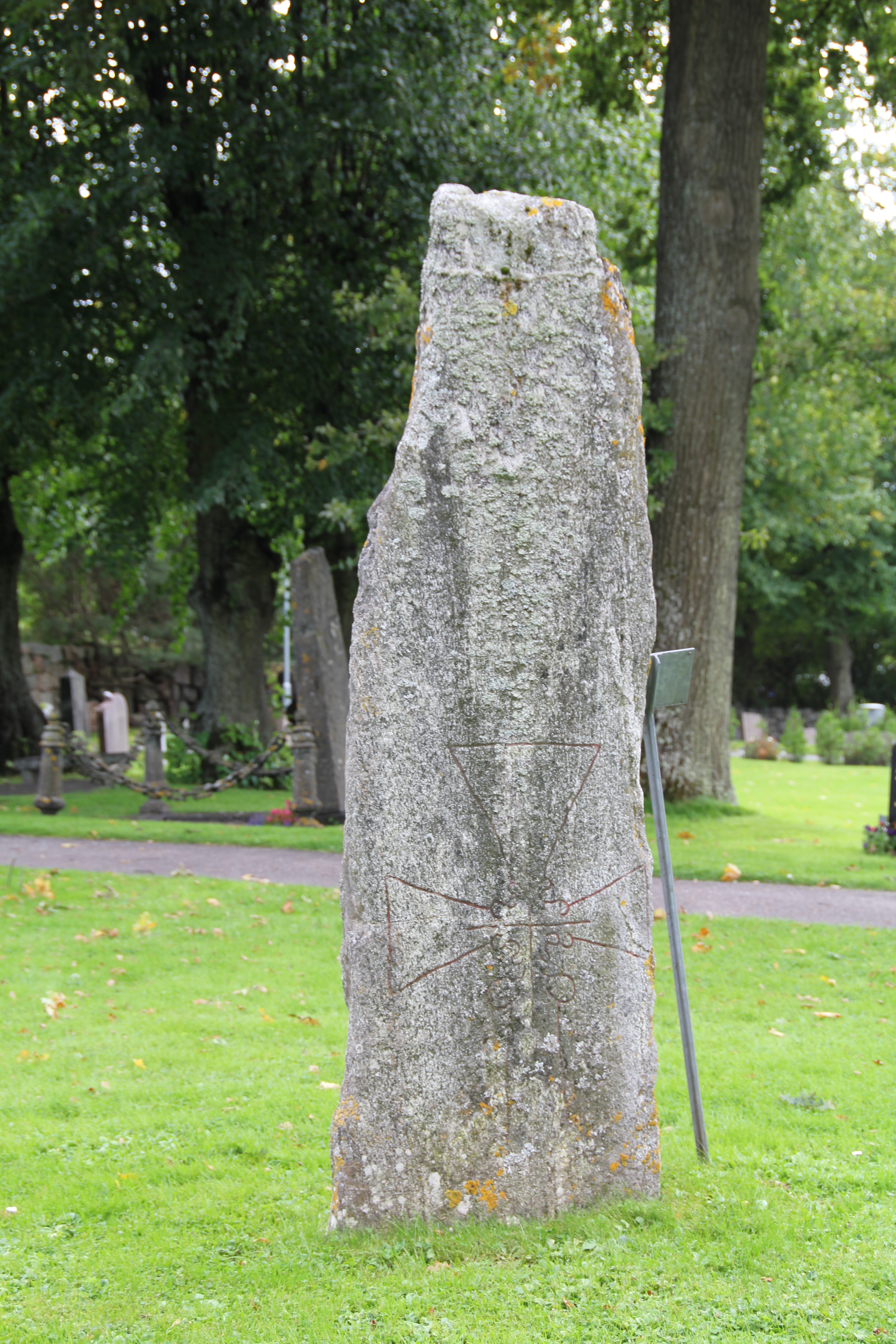 Runstenen U 61 vid Spånga kyrka. Baksidan med en ristning av ett kors.